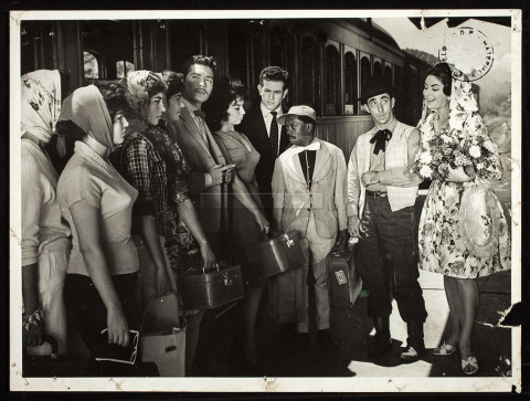 Grande Otelo; Ankito; Renata Fronzi